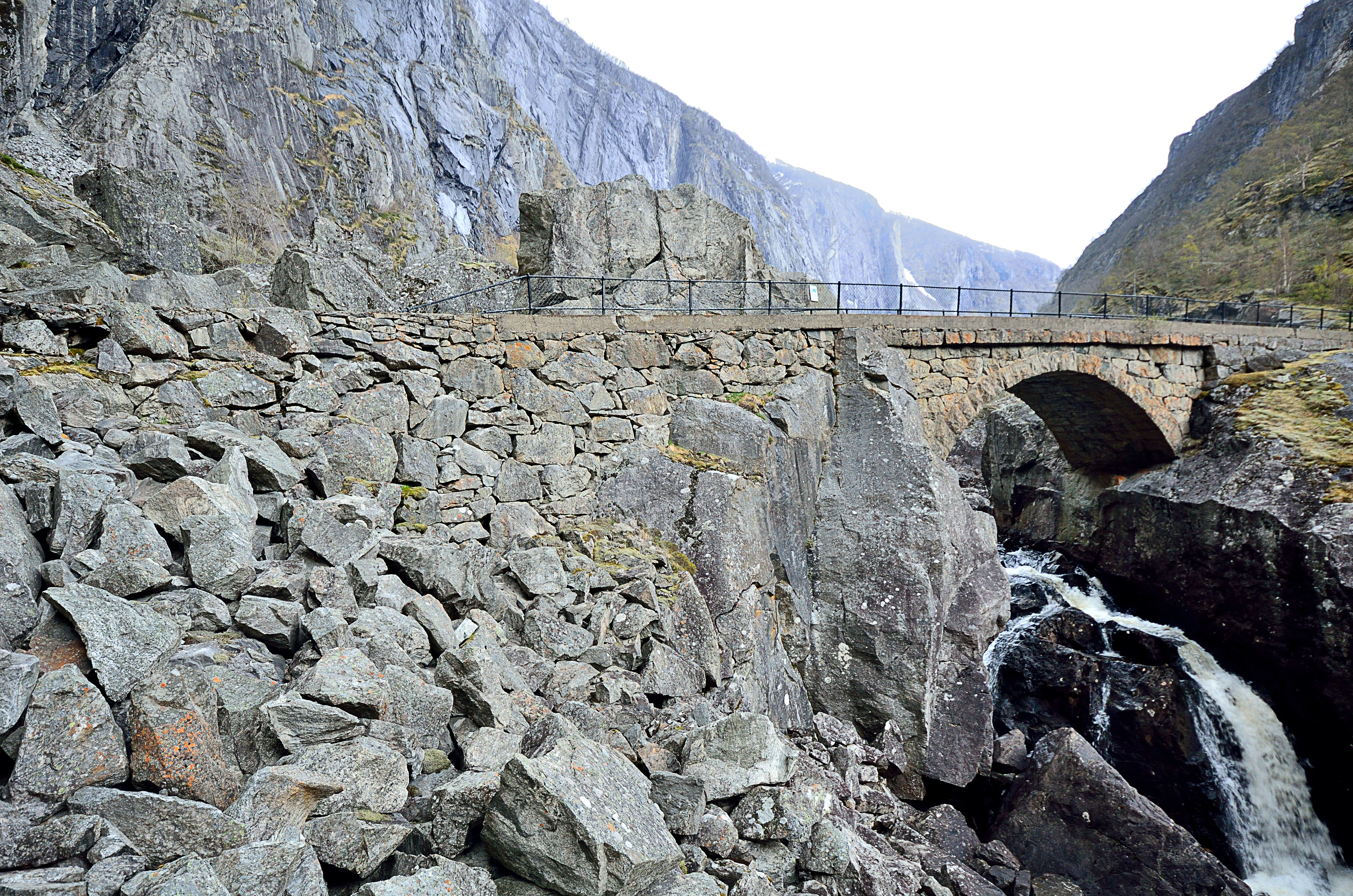 Måbø bru - midt i Måbødalen